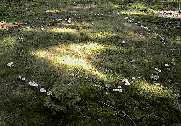 Hexenring